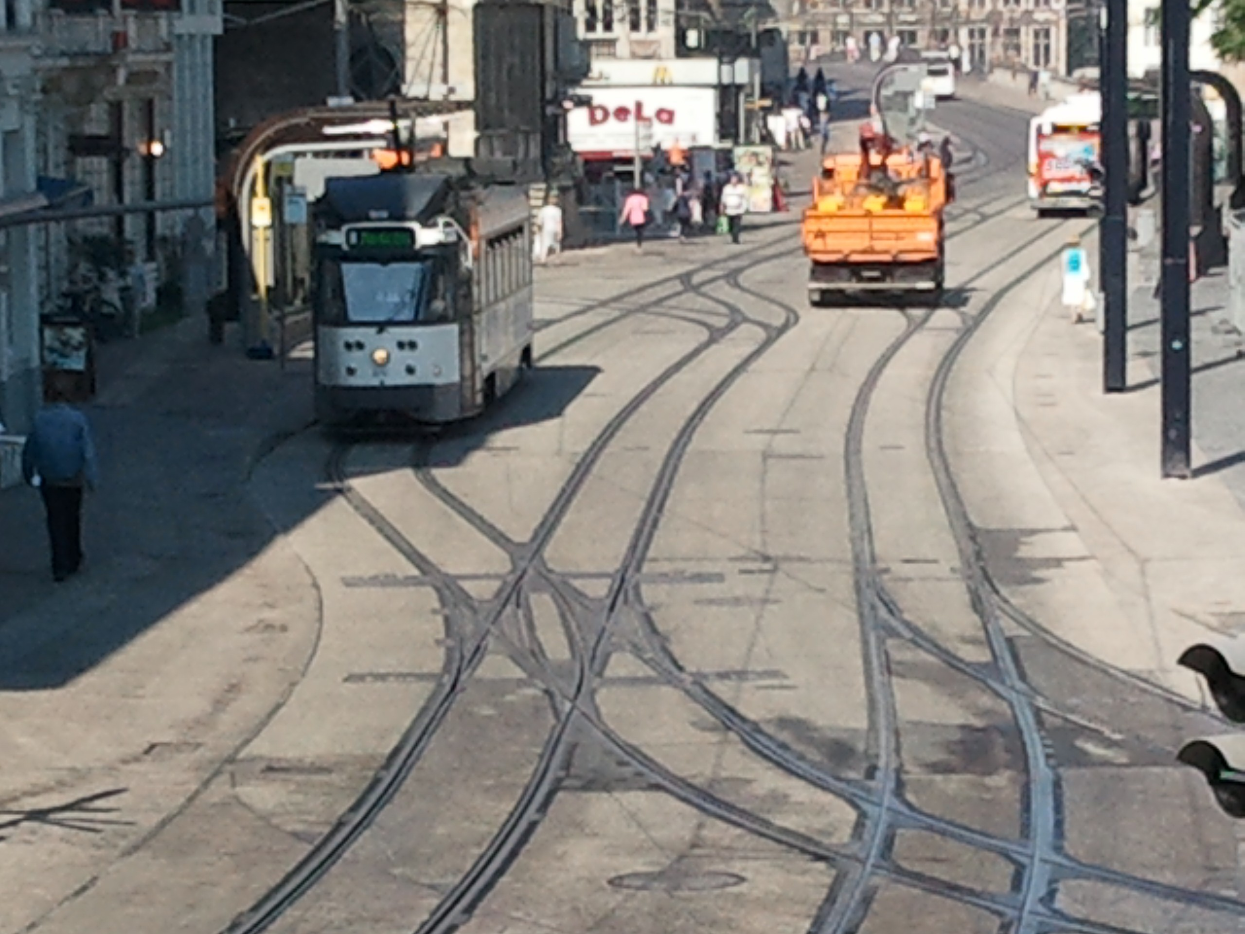 Tramway de Gand - Aménagement complexe des voies devant l'église Saint-Nicolas